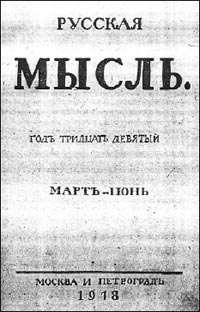 Русская мысль